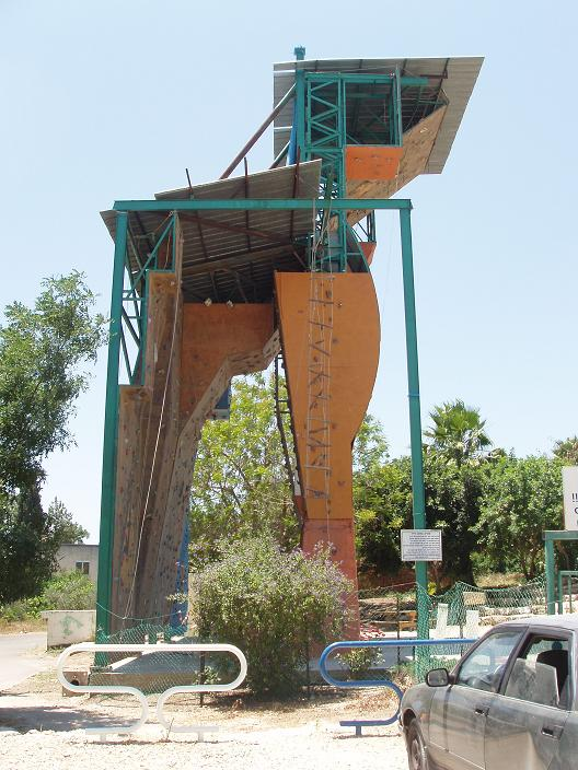 קיר טיפוס ע"ש שגיא בלאו, רמת ישי. צילם דוד שי